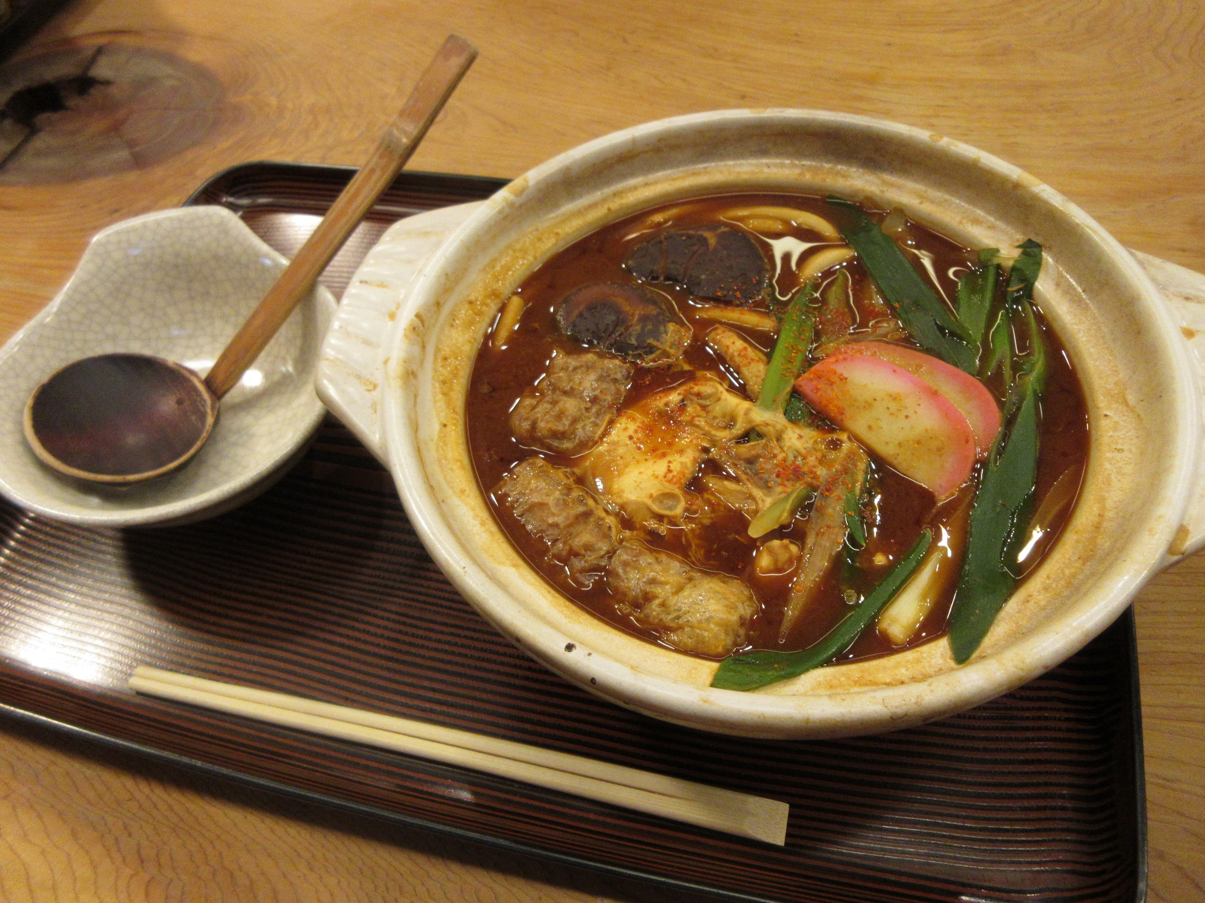 八丁味噌煮込みうどん（愛知県岡崎市のうどん屋にて）